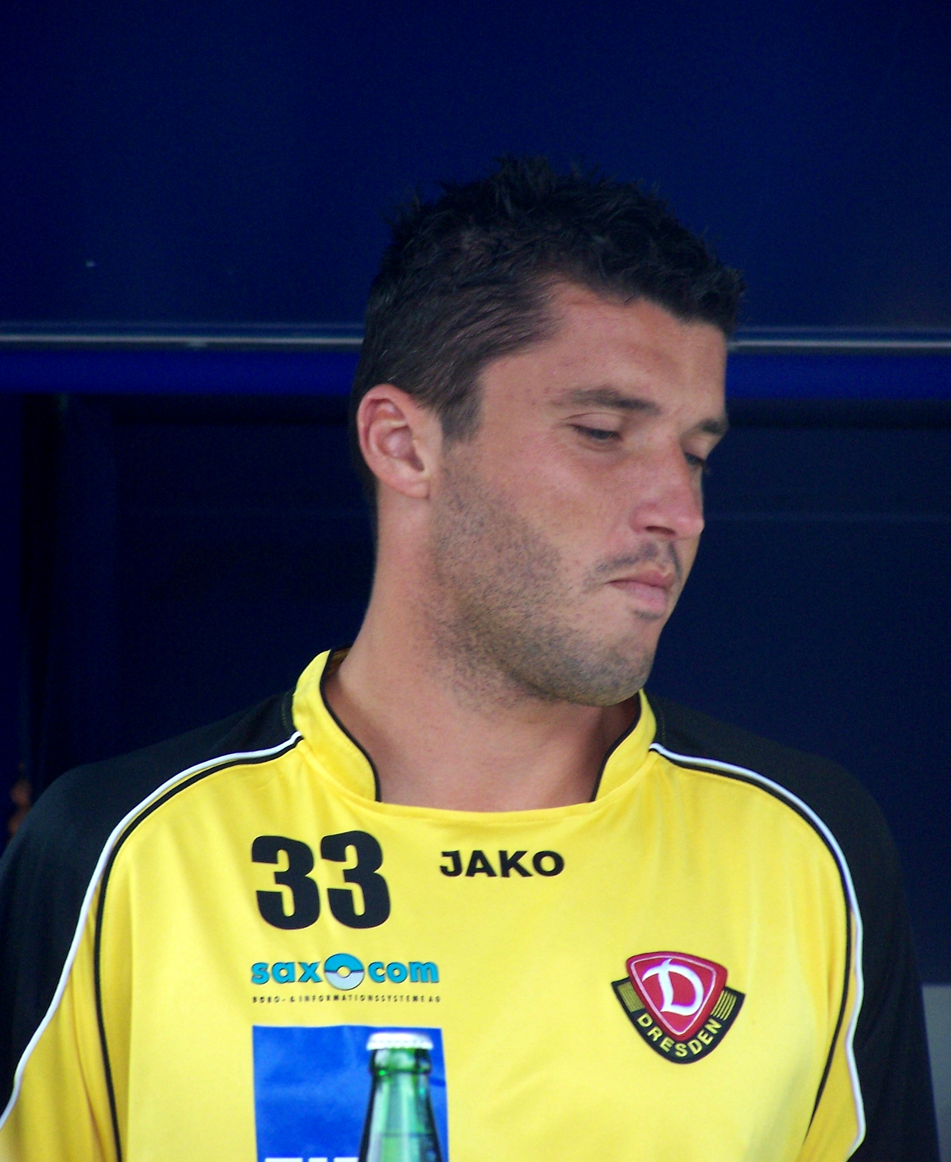 Pavel Dobry bei der Teampräsentation von Dynamo Dresden zum Start der Drittliga-Saison 2008/09